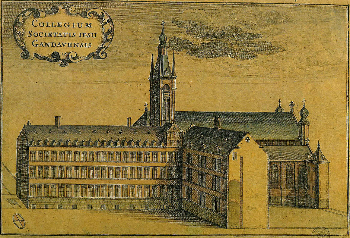 Het voormalige Jezuïetenklooster aan de Voldersstraat te Gent - Oost-Vlaanderen - België